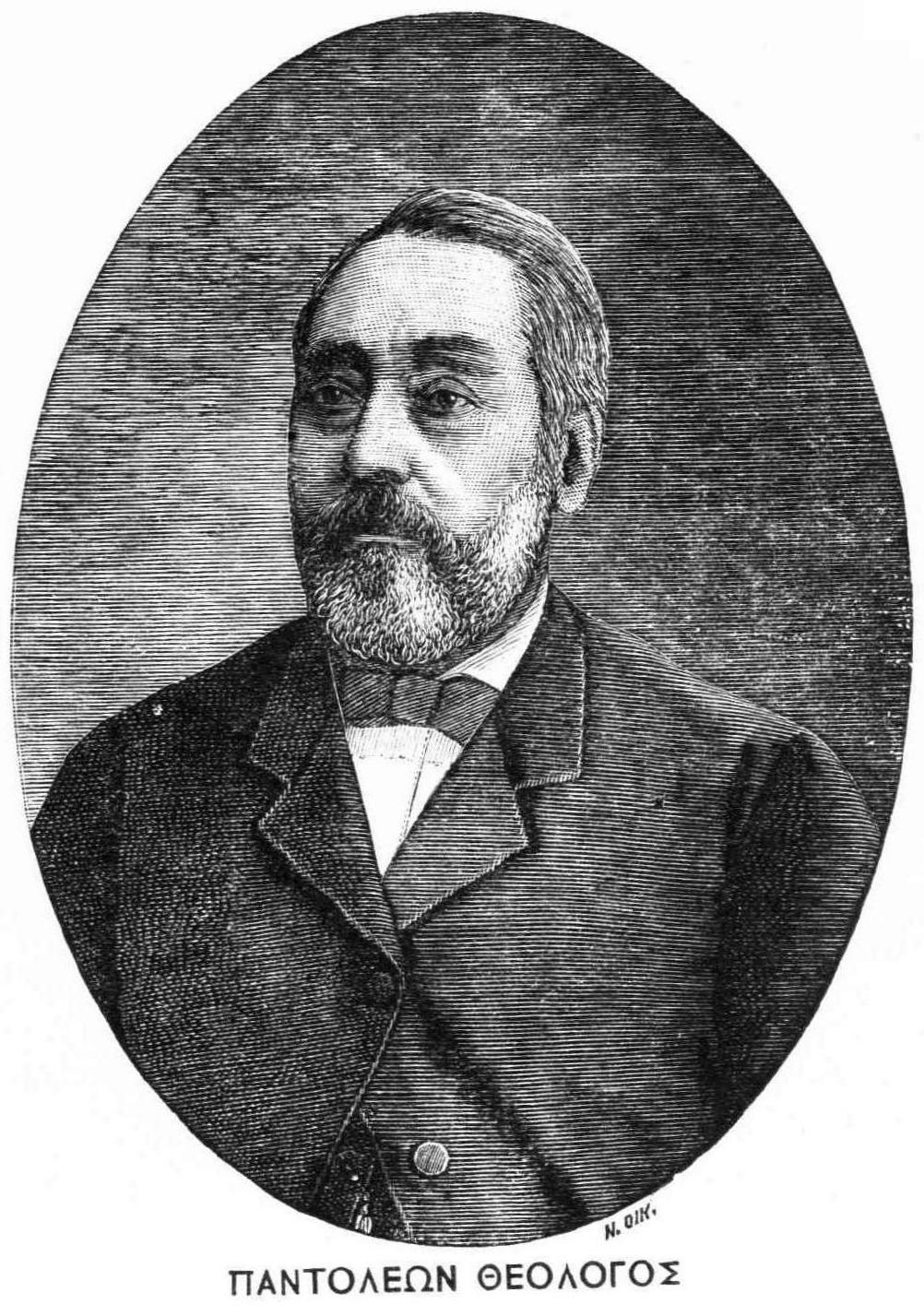 Griechische Persönlichkeit 19. Jahrhundert